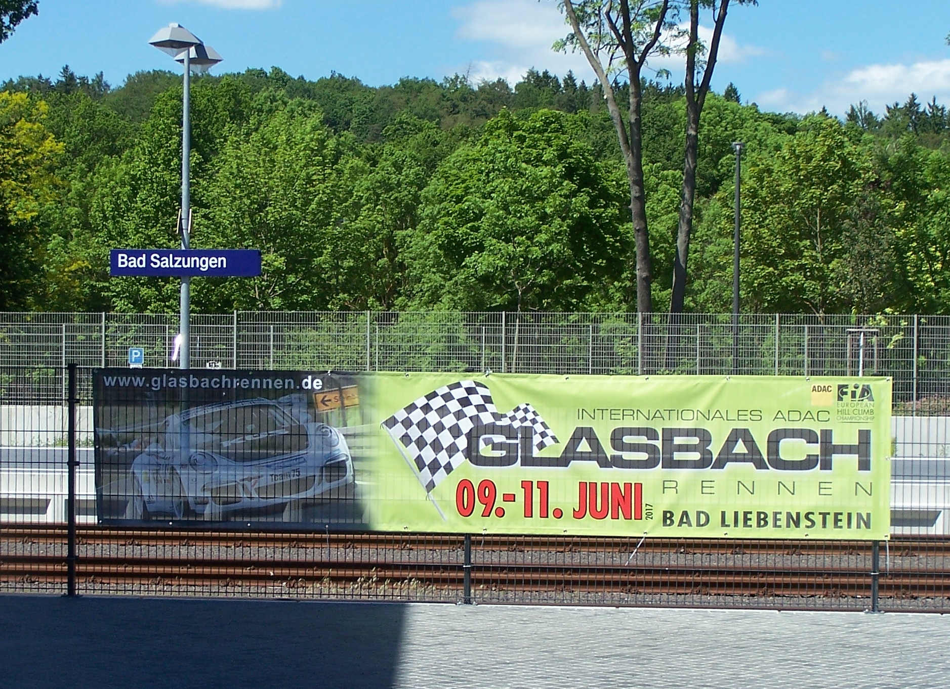 Am Bahnhof in Bad Salzungen angebrachte Werbebanner zum Glasbachrenen 2017.